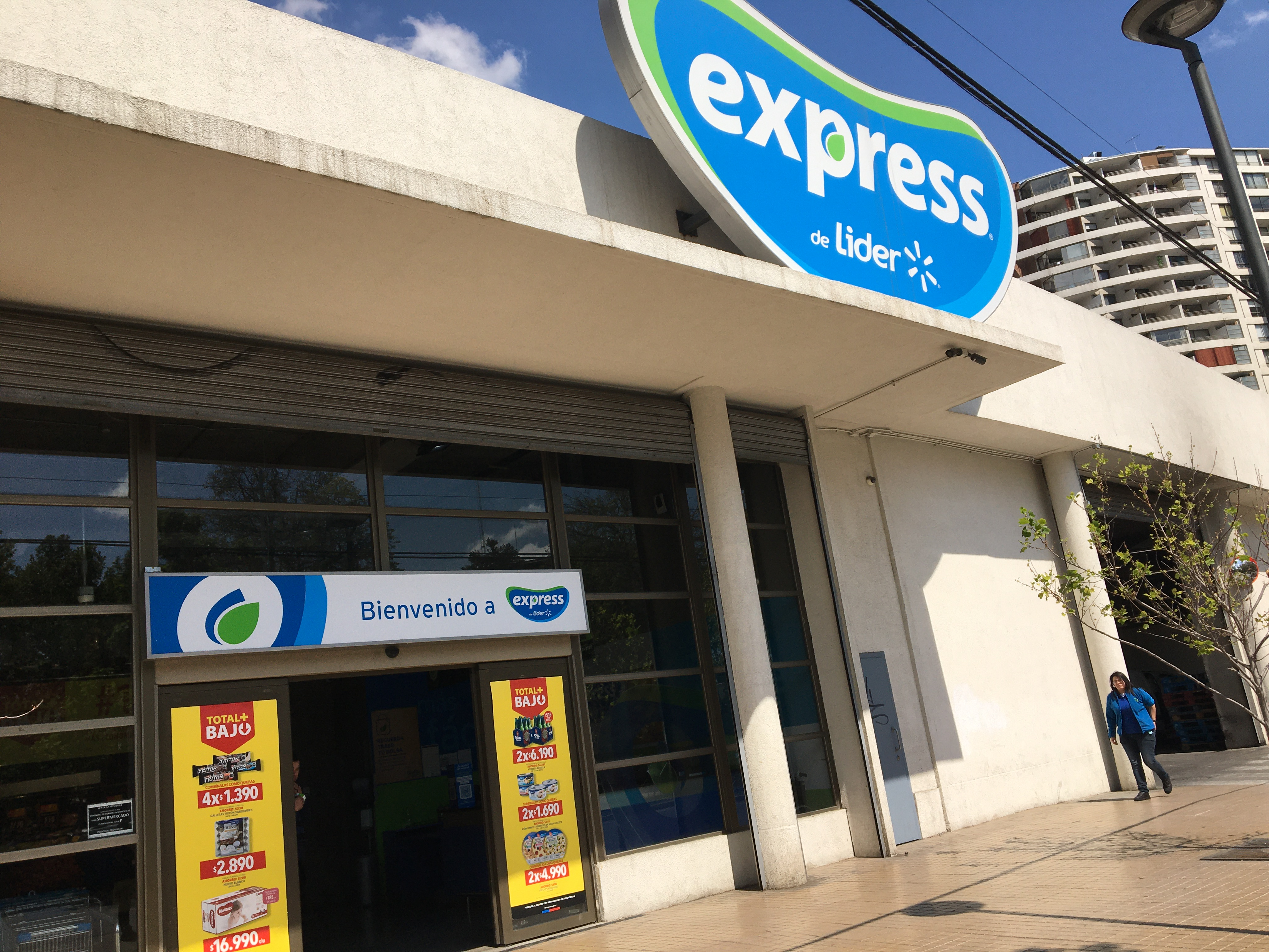 Frontis Express de Lider